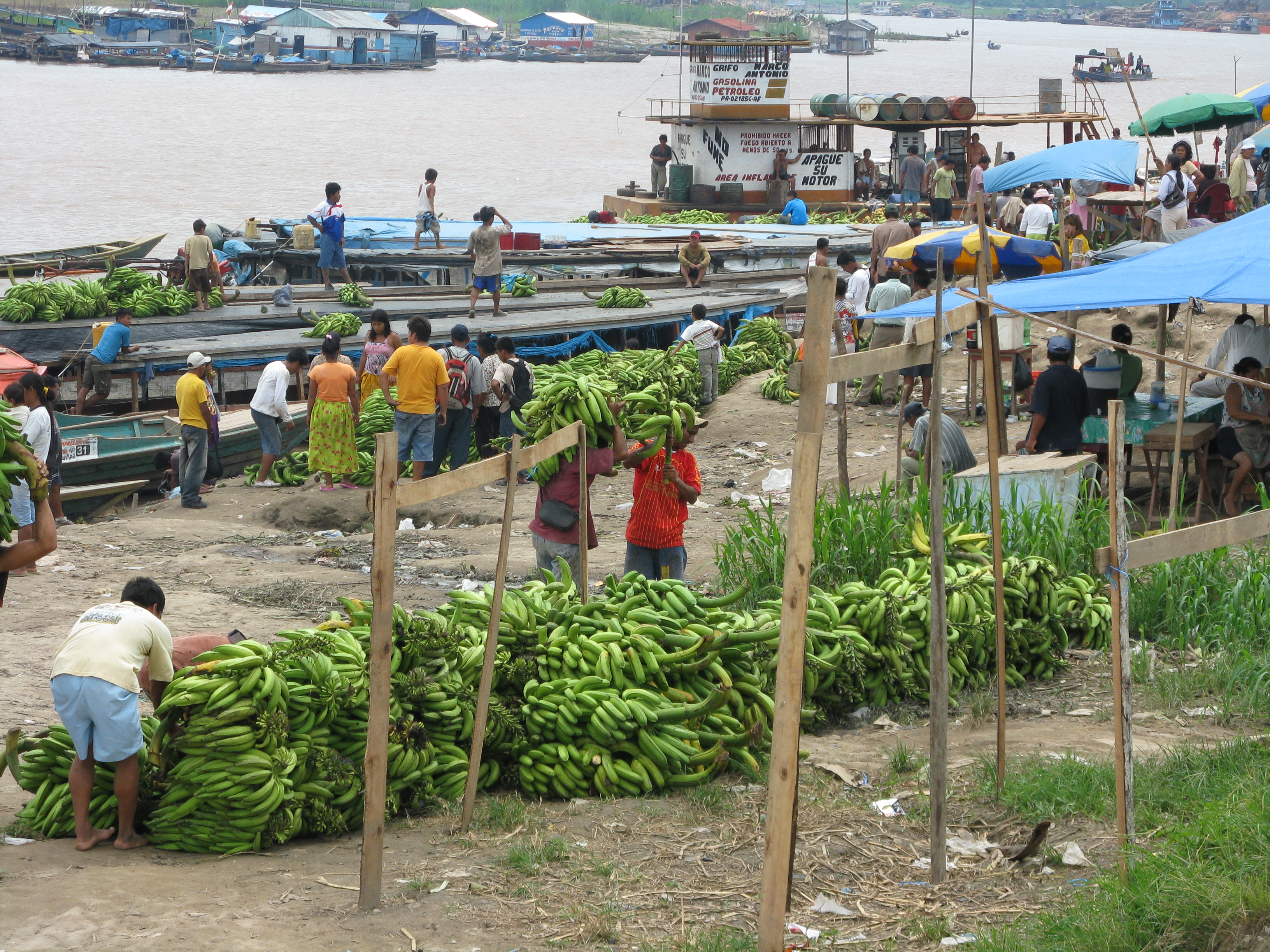 Flusshafen am Rio Ucayalli